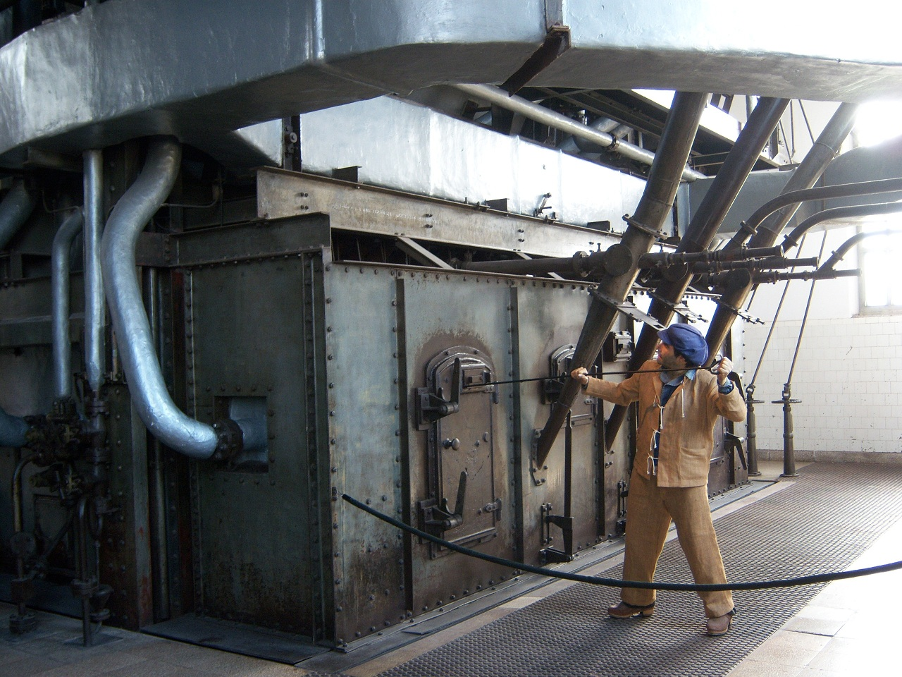 Boneco Chegador ao Museu da Electricidade (Central Tejo)